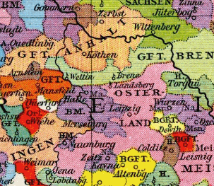 Heiliges Römisches Reich im 13. Jahrhundert, Ausschnitt Osterland